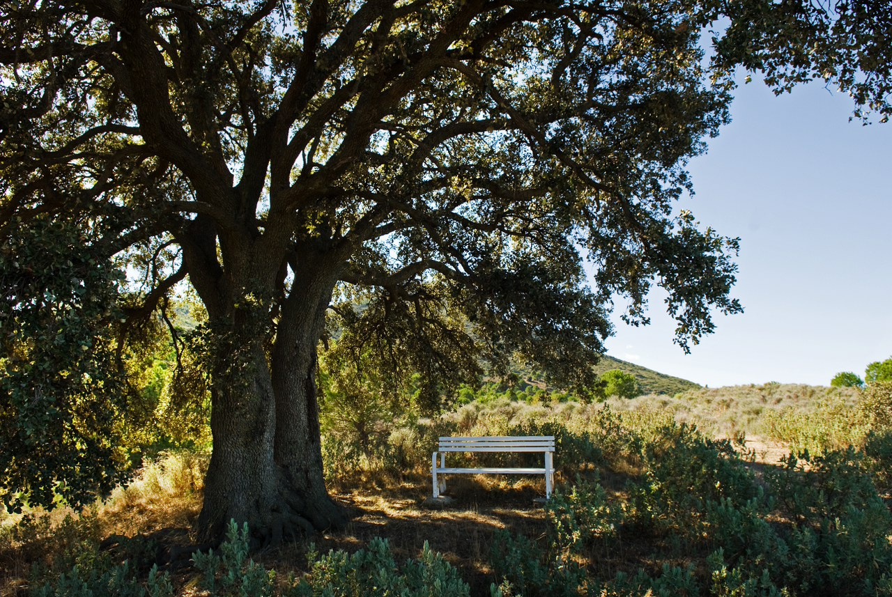 Banco situado en los pies de una gran carrasca en el Cabezo de la Jara